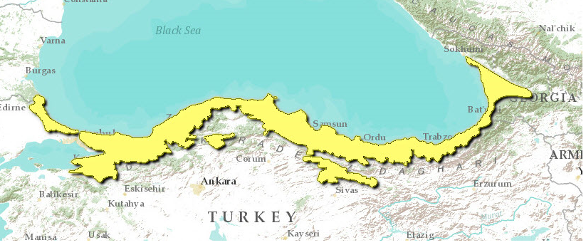 Mappa dell'ecoregione PA0422 - Foreste di latifoglie del mar Nero orientale e meridionale